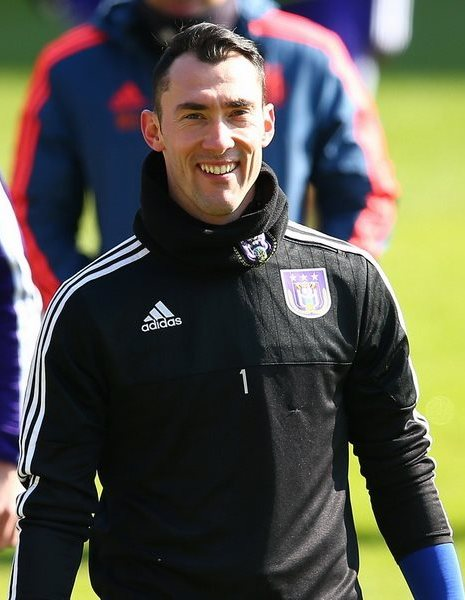 Сільвіо Прото - футболіст, воротар ФК Андерлехта